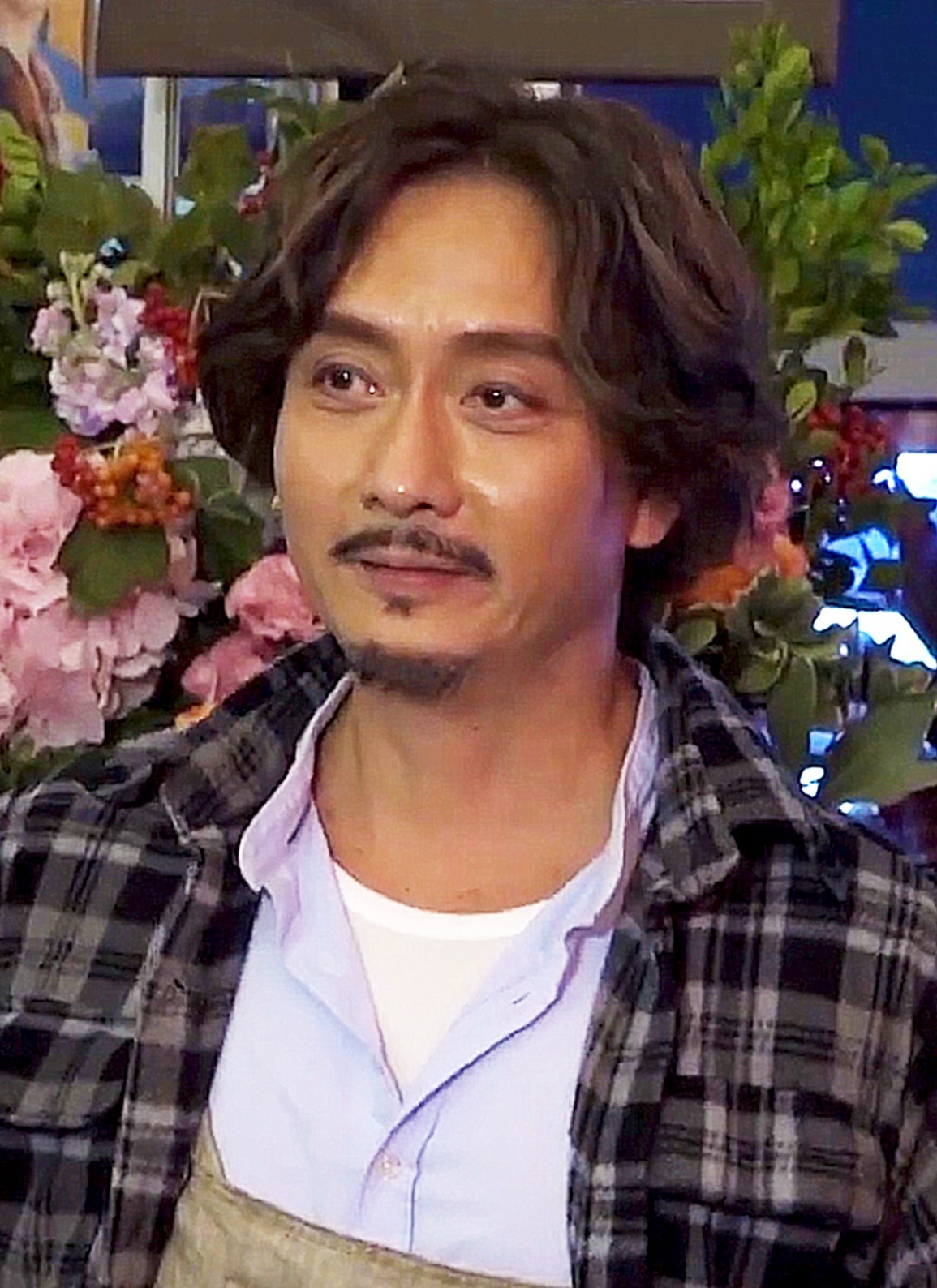 中文（香港）: 1997年憑電影《南海十三郎》中「江譽鏐」一角奪得第34屆金馬獎最佳男主角